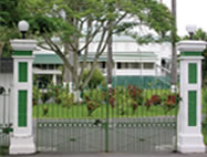 siedziba prezydenta Gujany